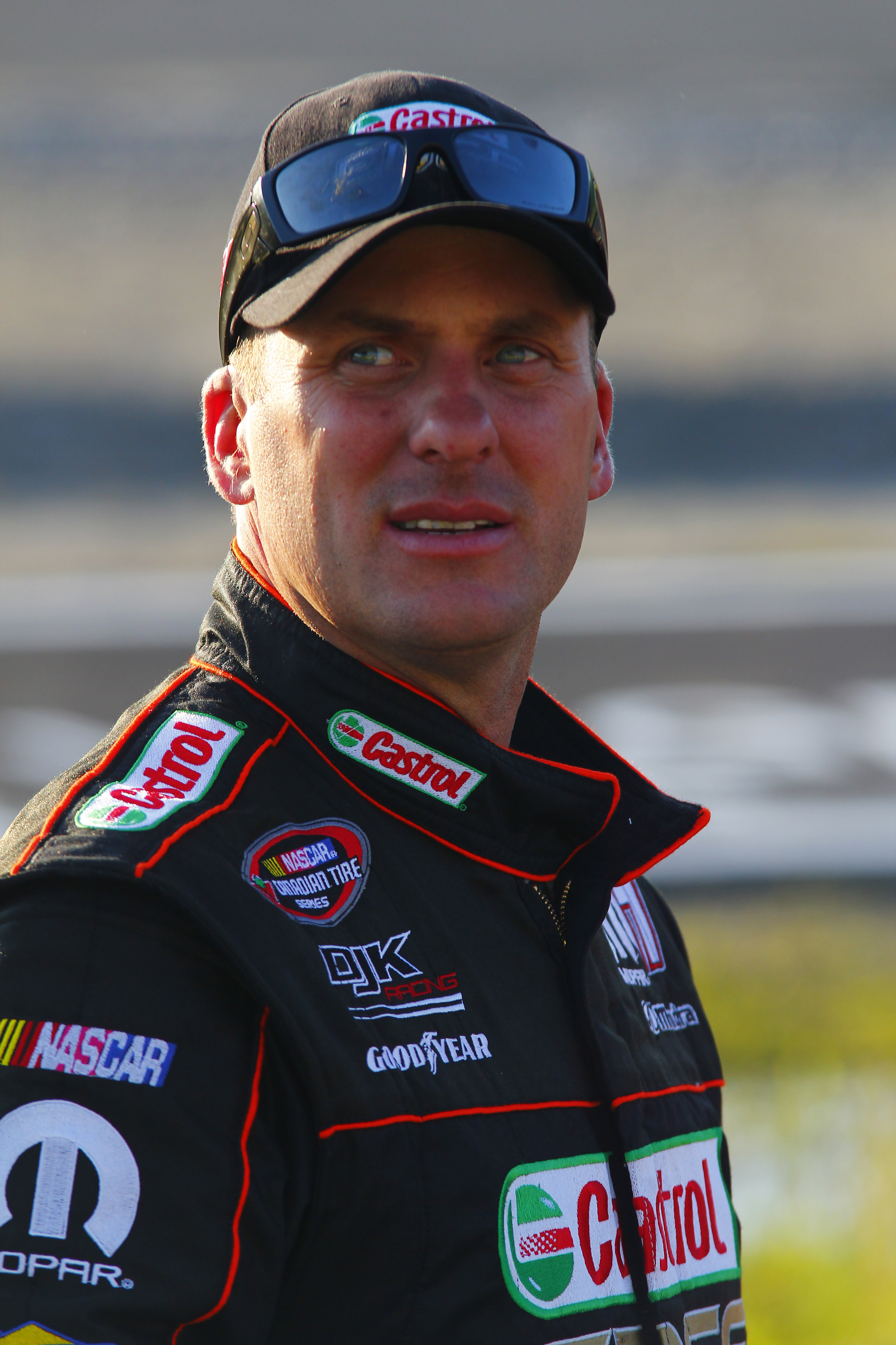 D.J. Kennington - Autodrome Chaudière - Nascar Canadian Tire Series - 13 juin 2015 (Photo Paul-Émile Poulin-Jacques)